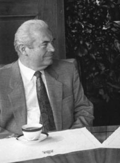 Title: Hannover, Besuch Werner Eberlein, Schalstieg People in the image: Eberlein, Werner: Sekretär der Bezirksleitung Magdeburg der SED, DDR Factual corrections and alternative descriptions are encouraged separately from the original description. Additionally errors can be reported at this page to inform the Bundesarchiv. Original historic description: ADN-ZB Kluge 2.7.1987-A-BRD: Werner Eberlein in Niedersachsen. Der Oberbürgermeister Hannovers und Vorsitzende des "Deutschen Städtstages" der BRD, Herbert Schmalstieg (SPD, r.) empfing die in Niedersachsen weilende SED-Delegation unter Leitung von Werner Eberlein, Mitglied des Politbüros des ZK und 1. Sekretär der Bezirksleitung Magdeburg der SED (M.) zu einem Gespräch. L.: Ewald Moldt, Leiter der Ständigen Vertretung der DDR in der BRD."